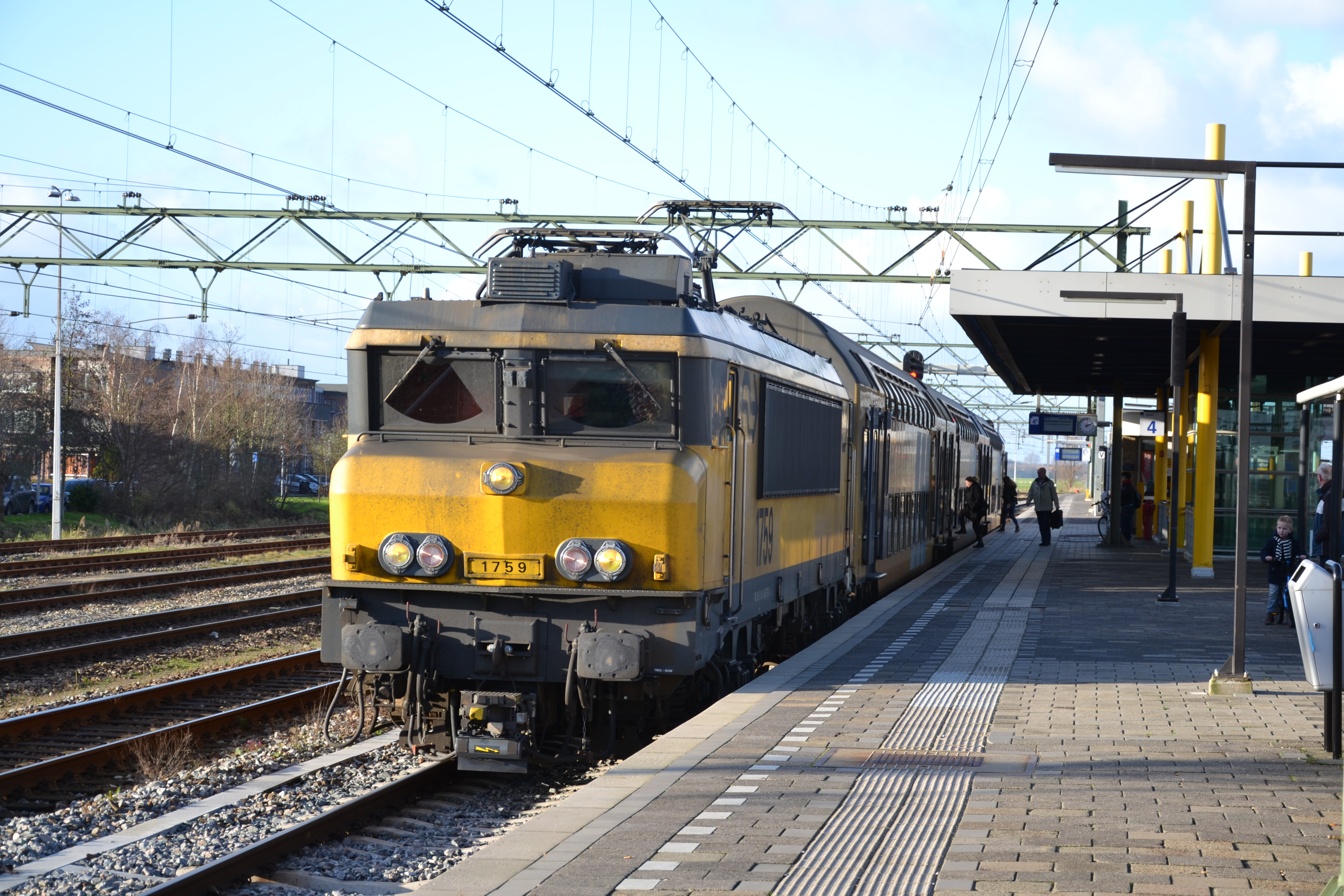 Afscheid nemen bestaat niet, zong Marco Borsato eens. En nu de NS met een gigantisch materieeltekort zit blijkt dit weer eens waar te zijn: het DDAR is terug! In mei 2013 had ik afscheid genomen van de turbosprinters met houten kont-bankjes, maar nu is het weer terug, nog turbosprinterig en met nog harder lijkende bankjes. De trein zelf heb ik niet echt gemist, maar het is wel weer leuk om het knuffelhoekje terug in de trein te hebben...